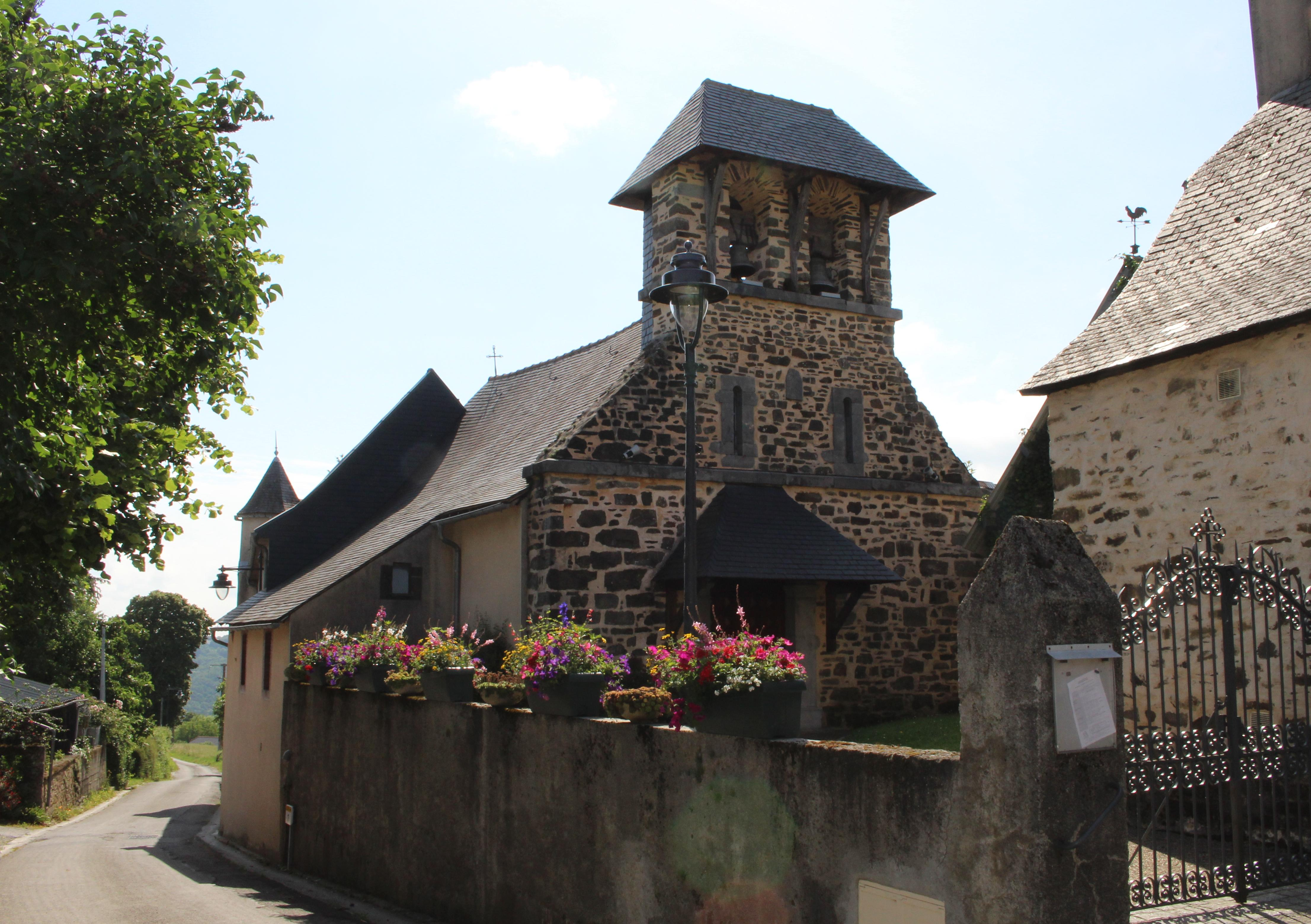 Église Saint-Martin d'Averan (Hautes-Pyrénées)